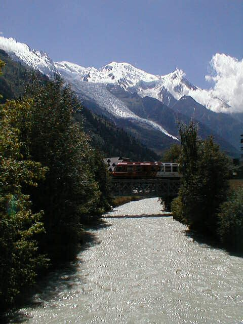 Description: Arve à Chamonix-Mont-Blanc. Sur le pont, passe une rame « Z800 » de la ligne Saint-Gervais-Vallorcine. Au fond, on aperçoit la chaîne du Mont Blanc, et notamment le glacier des Bossons. Source: photo prise par Christophe Jacquet à l'été fr:2001. © Christophe Jacquet, 2001. Licence